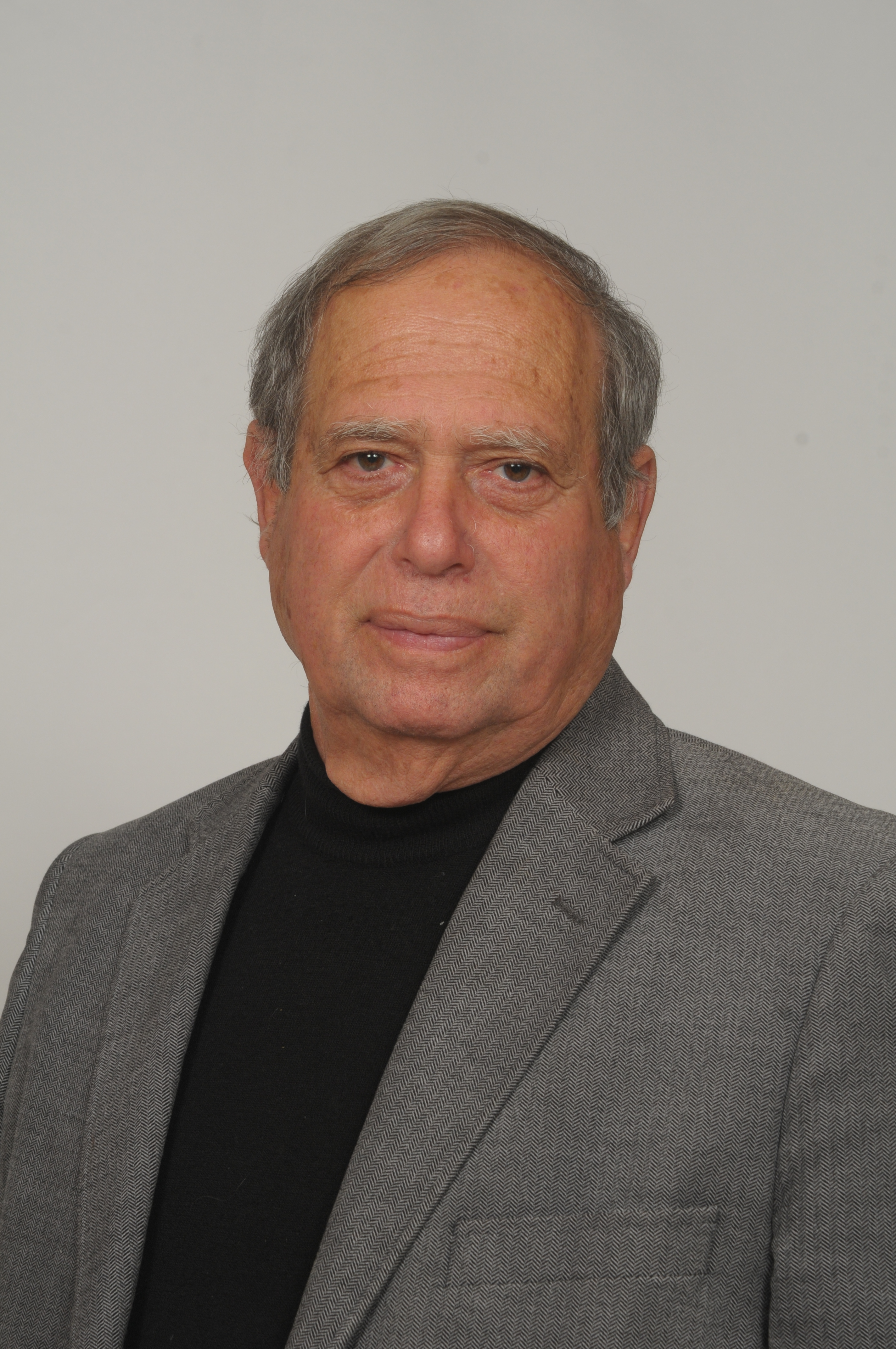 תמונת ד"ר דב ינאי